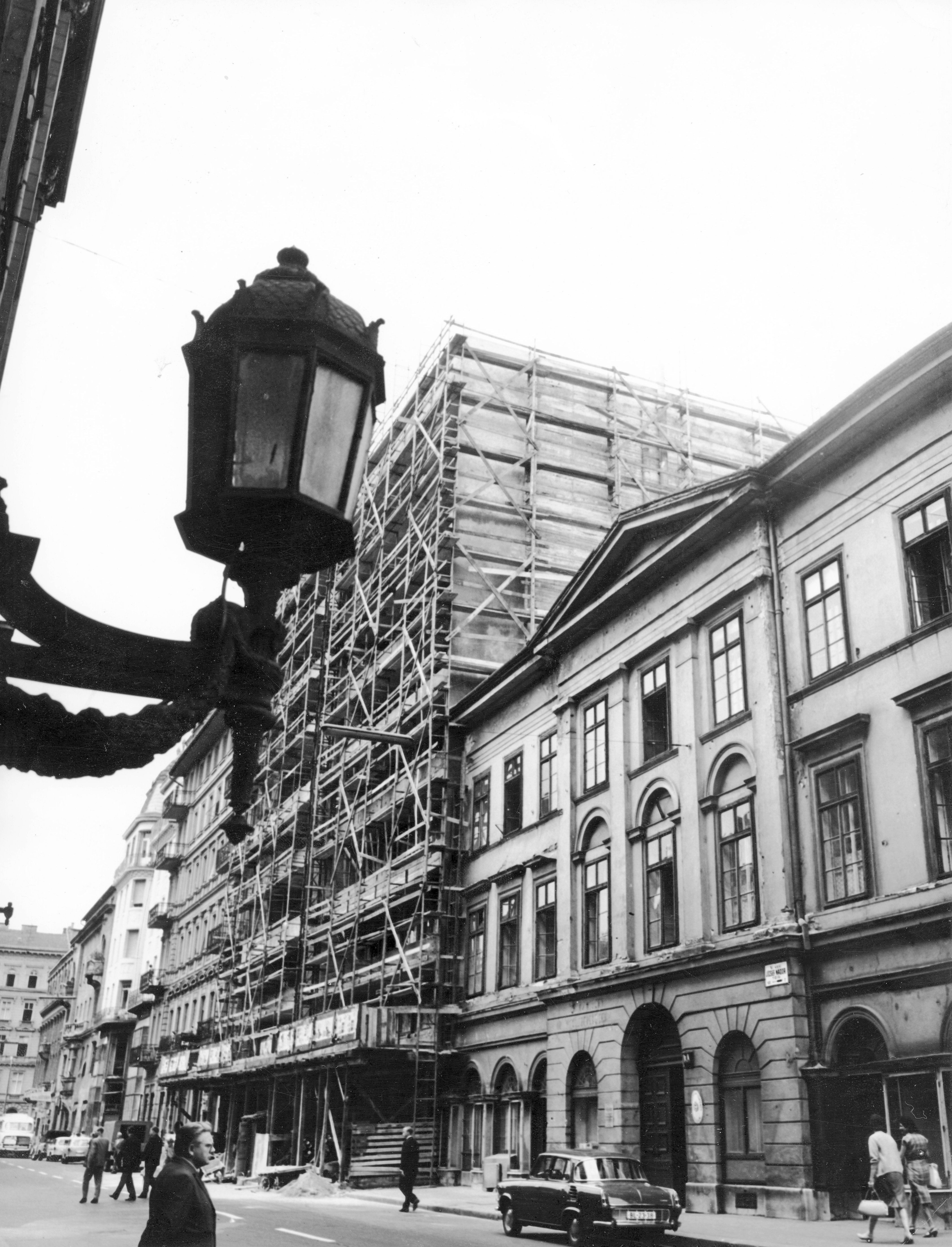 József nádor tér a Vörösmarty tér felől nézve, Budapest Location: Hungary, Budapest V. Tags: Budapest Title: József nádor tér a Vörösmarty tér felől nézve, 1966 Budapest